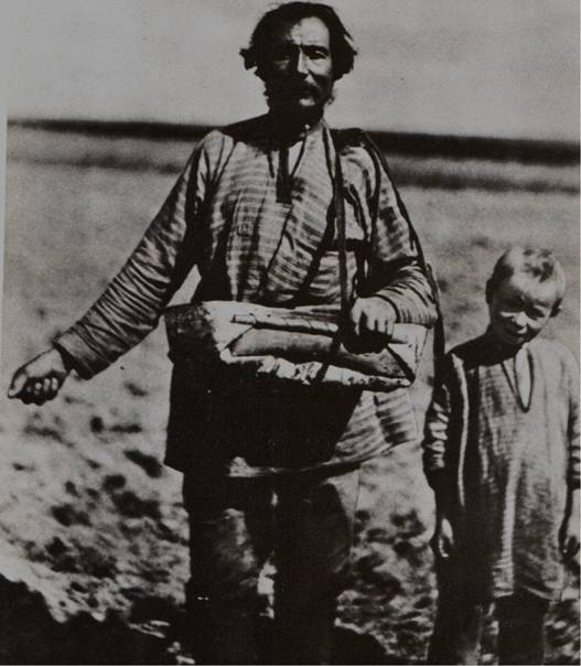 Сіяч. Селянин розкидує по полю зерня з лукошка-сівалки. Комі-зиряни. Фото поч. XX ст.